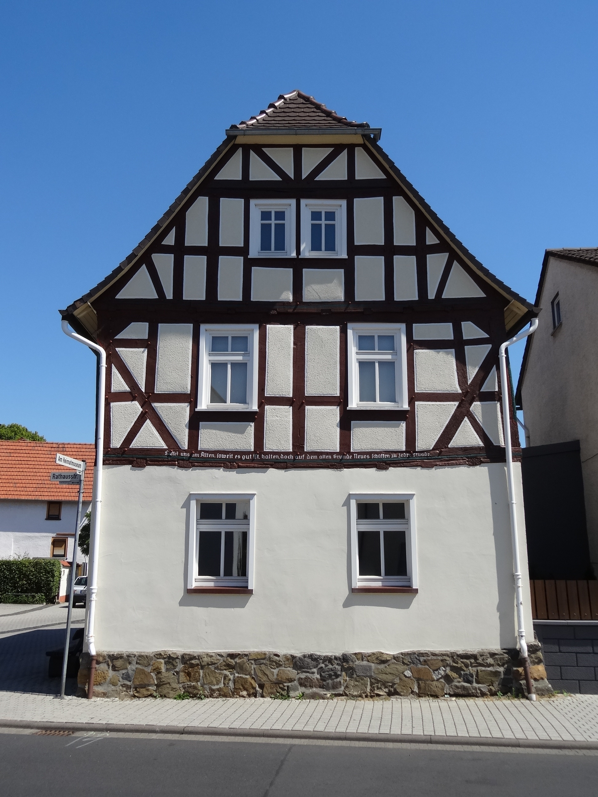 Rathausstraße 18 (Leihgestern)